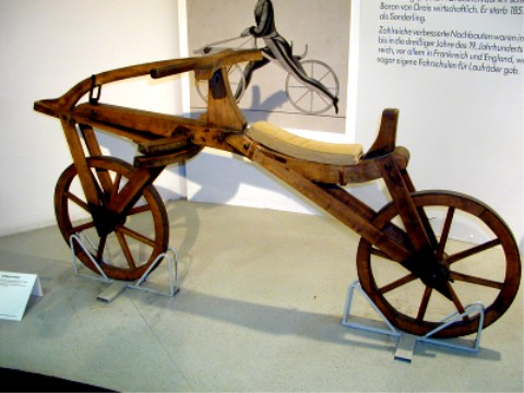 Laufrad des Freiherrn von Drais, "Draisine", Nachbau von 1817